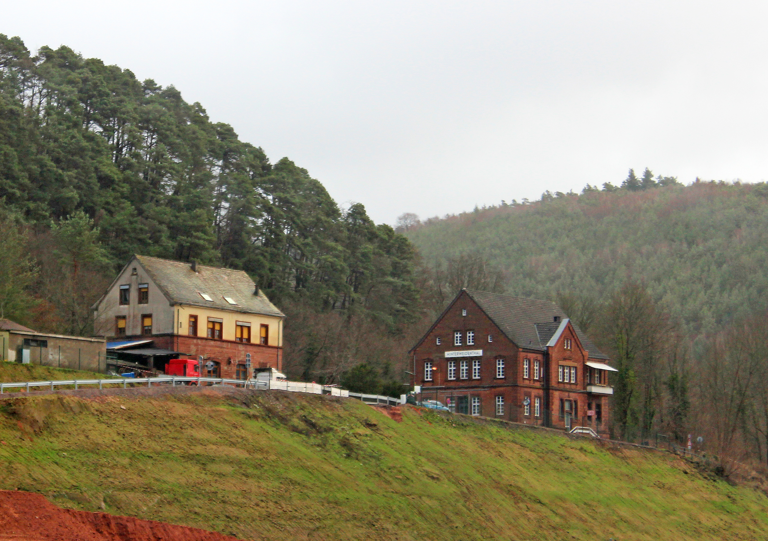 Blick von der B10 zum Bahnhof in Hinterweidenthal, Rheinland-Pfalz